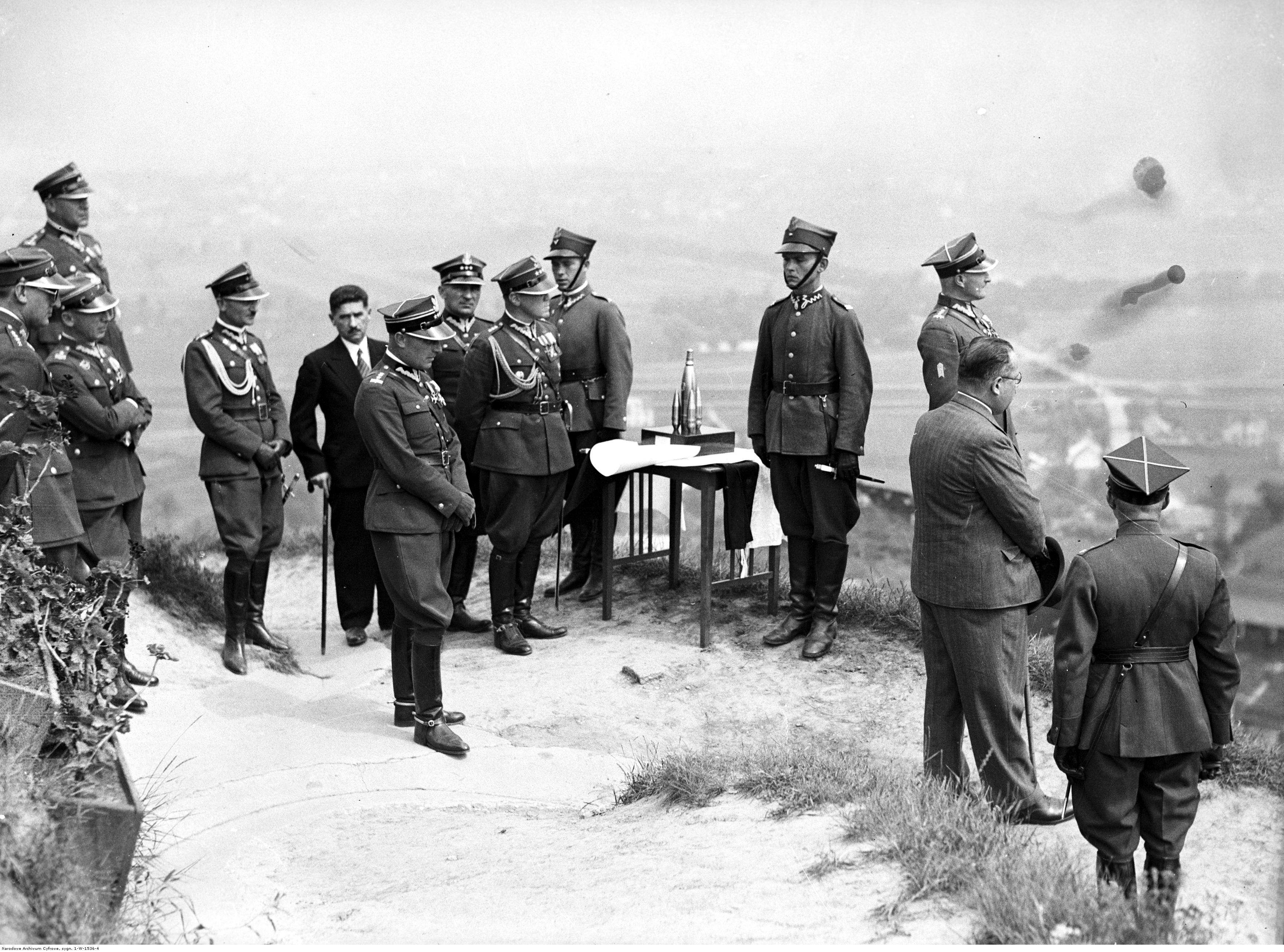 Święto 5. Dywizjonu Artylerii Przeciwlotniczej w Krakowie. Korpus oficerski oraz zaproszeni goście podziwiają panoramę z kopca Kościuszki w Krakowie. Koncern Ilustrowany Kurier Codzienny - Archiwum Ilustracji. Sygnatura: 1-W-1536-4